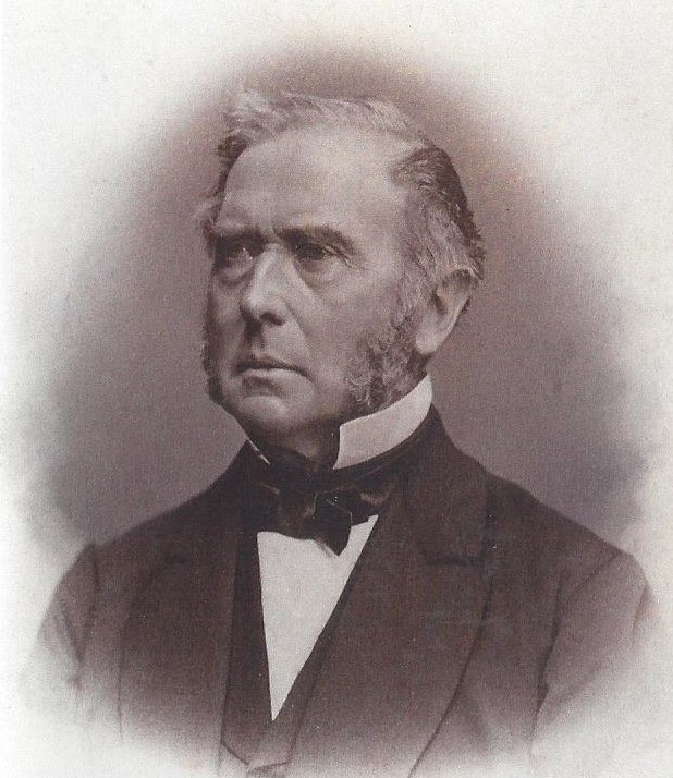 Porträtfotografie von Wilhelm Hartwig Beseler